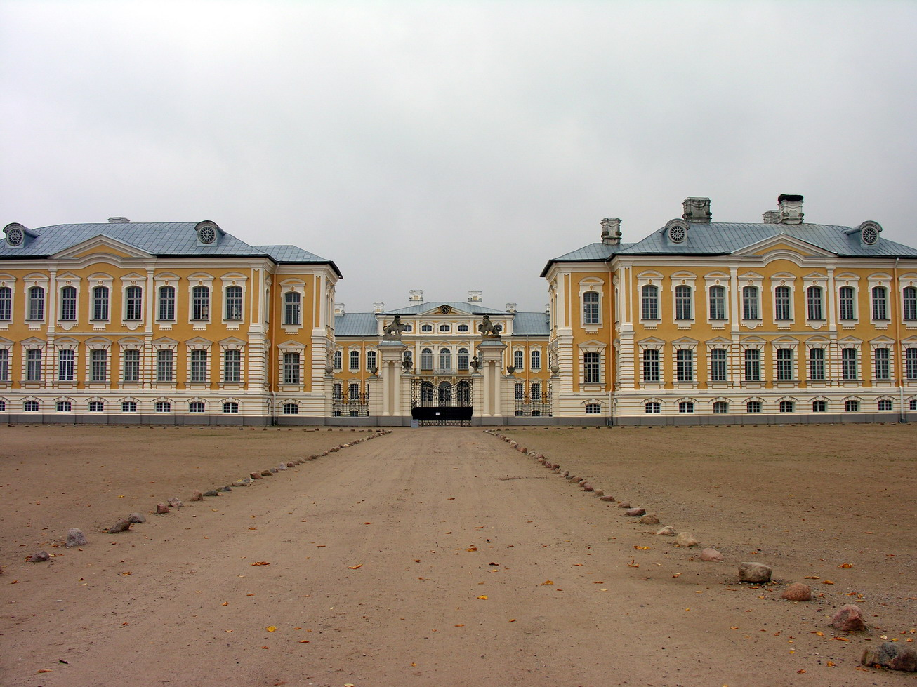 Žemaitėška: Rundalie (lt. Rundalė) , 2008-10-01